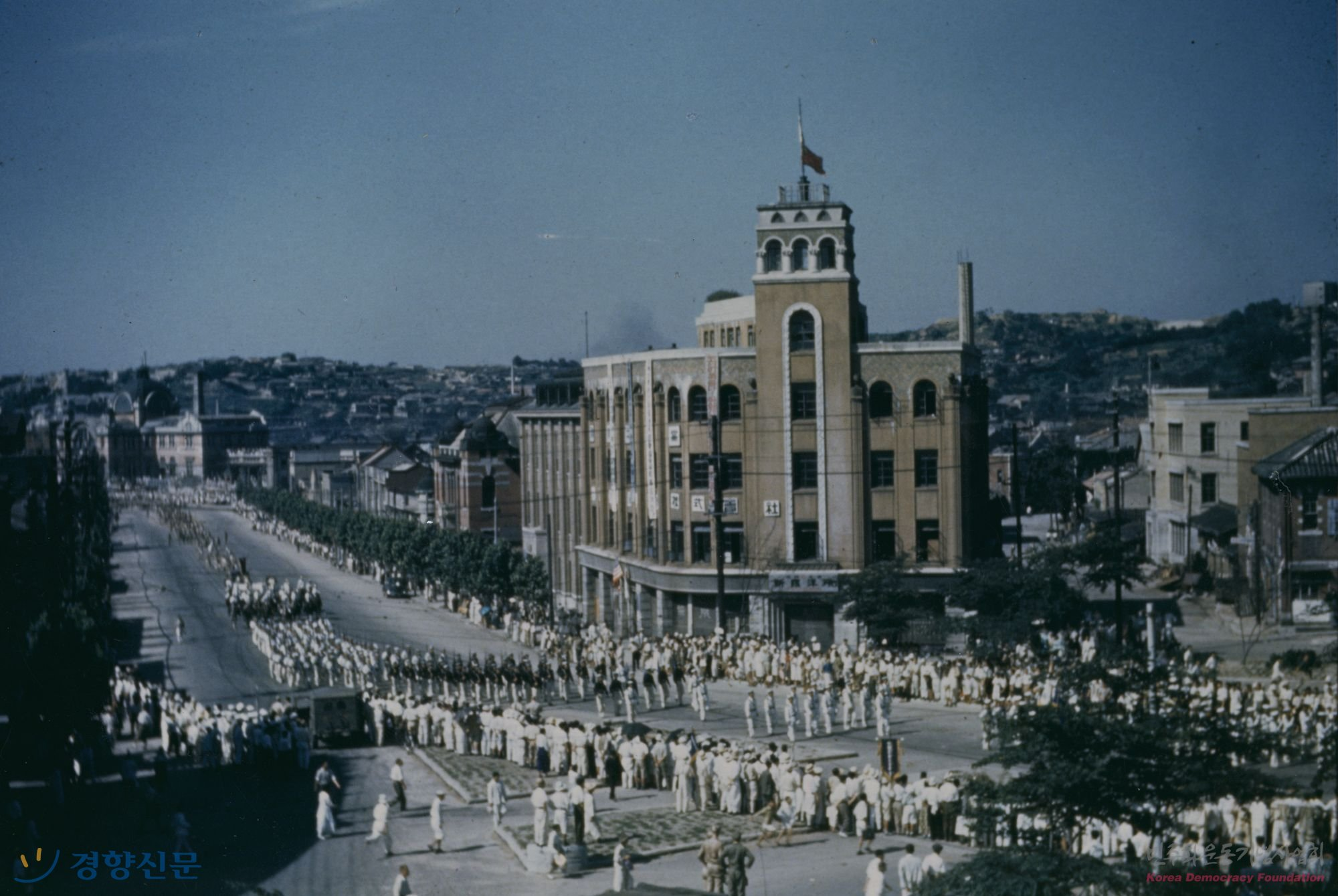 대한민국 정부 수립을 기념하는 국군의 시가 퍼레이드